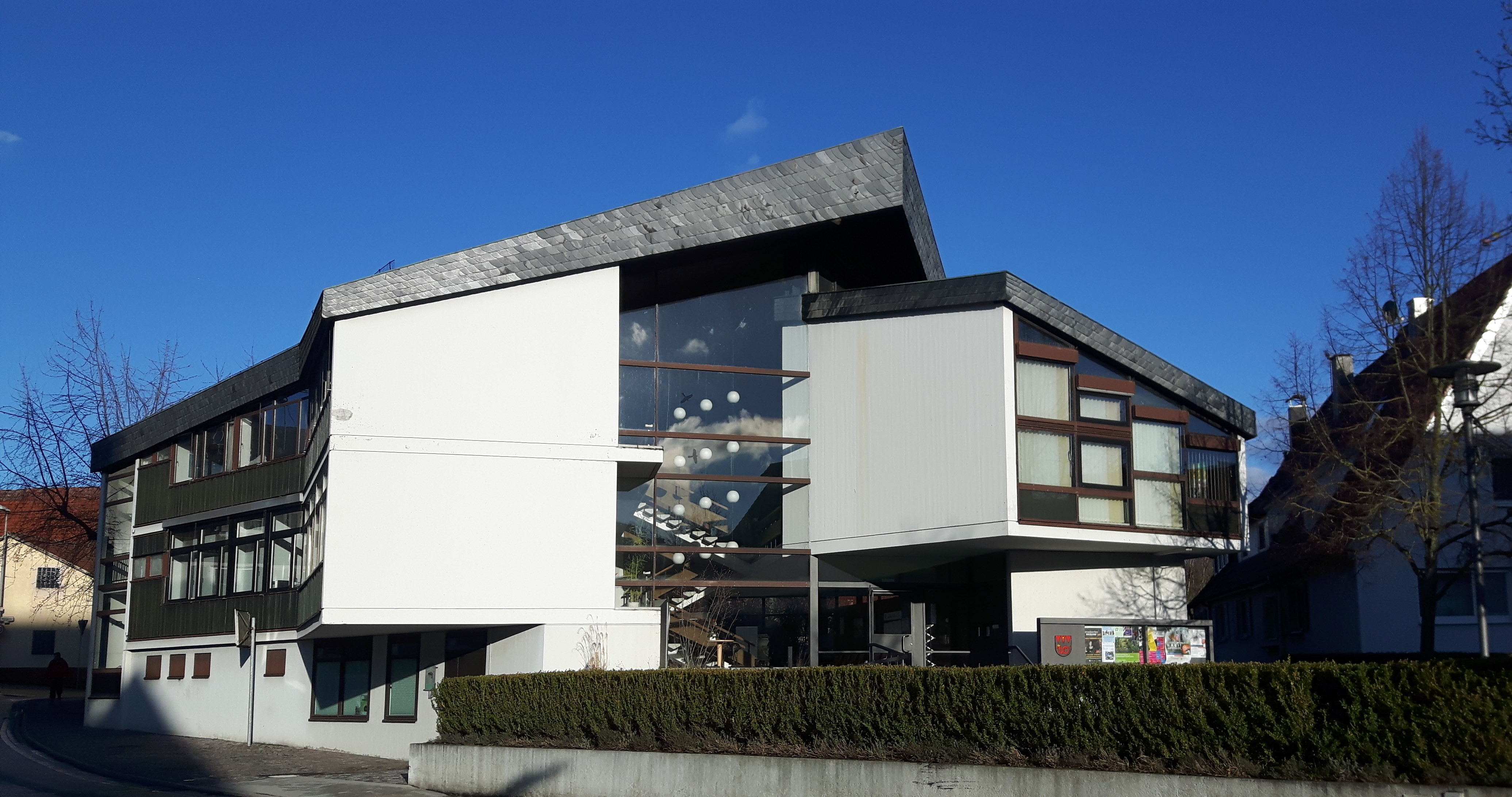 Das ehemalige Dagersheimer Rathaus, ist seit der Eingemeindung von Dagersheim nach Böblingen 1971 als Bezirksamt die zentrale Anlaufstelle für alle Bürgerbelange. Es steht unter Denkmalschutz.